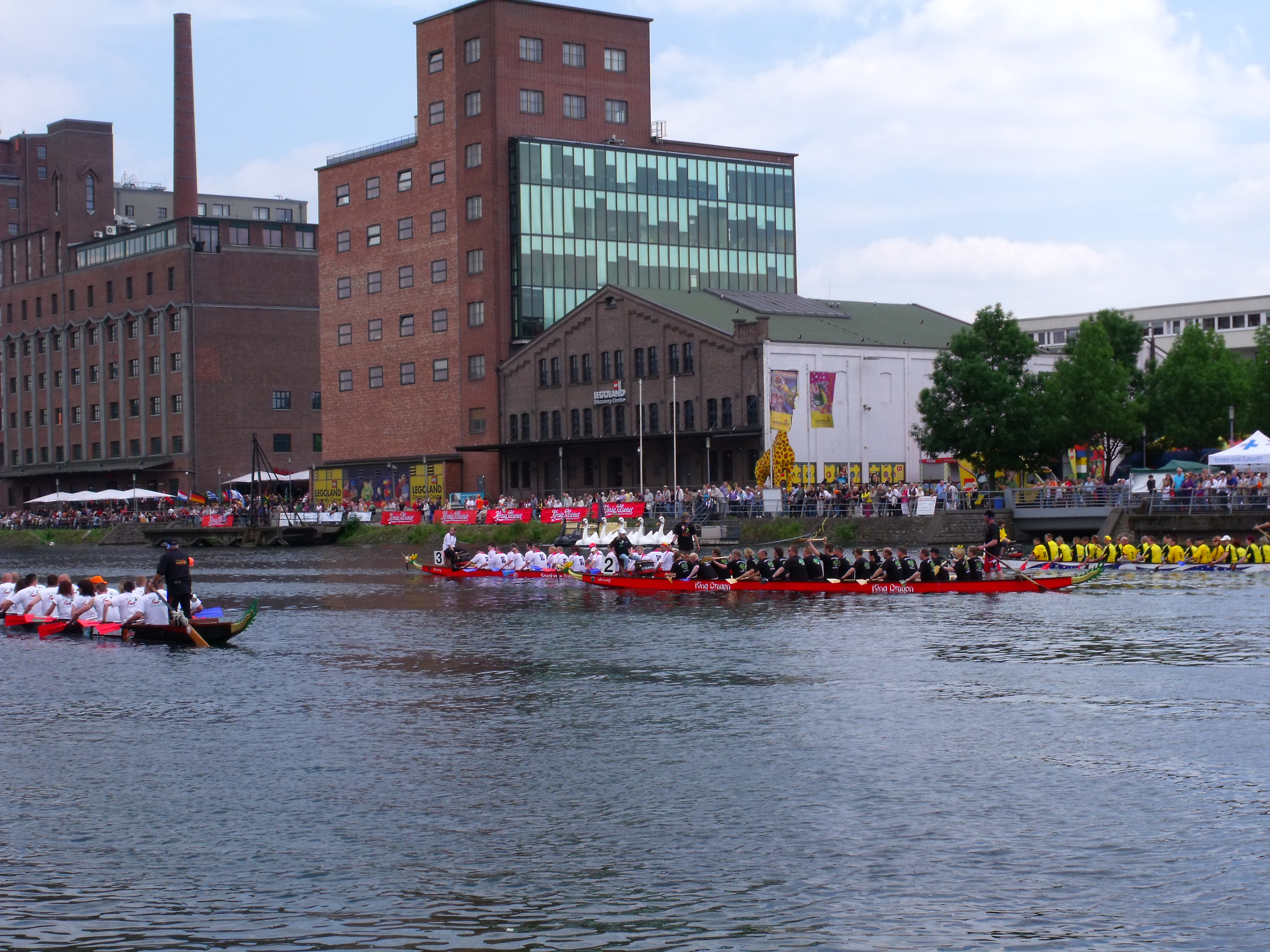 11. Drachenboot-Fun-Regatta im Duisburger Innenhafen